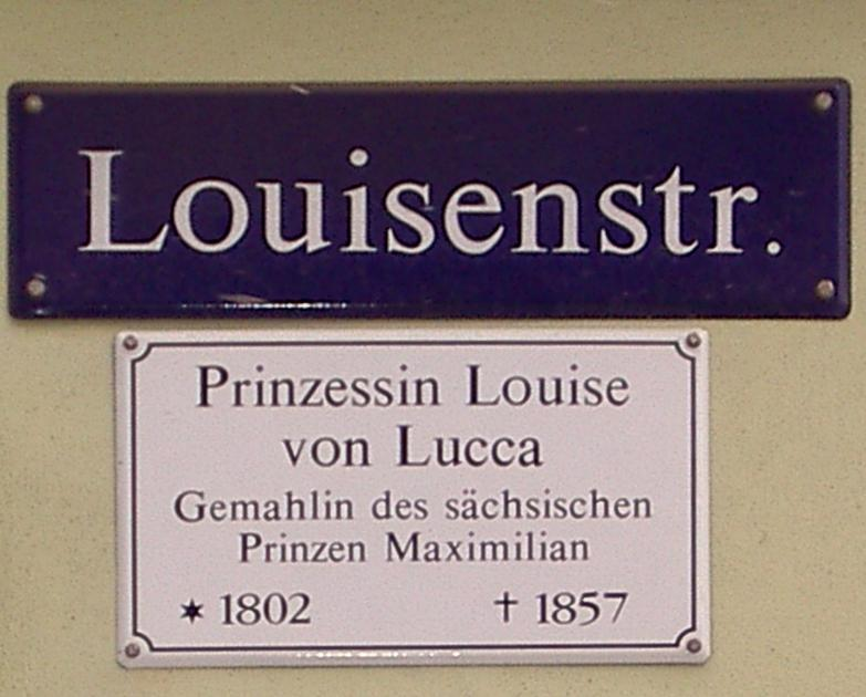 Straßenschild und Erklärung zur Louisenstraße an deren östlichem Ende (Nr. 95) in Dresden